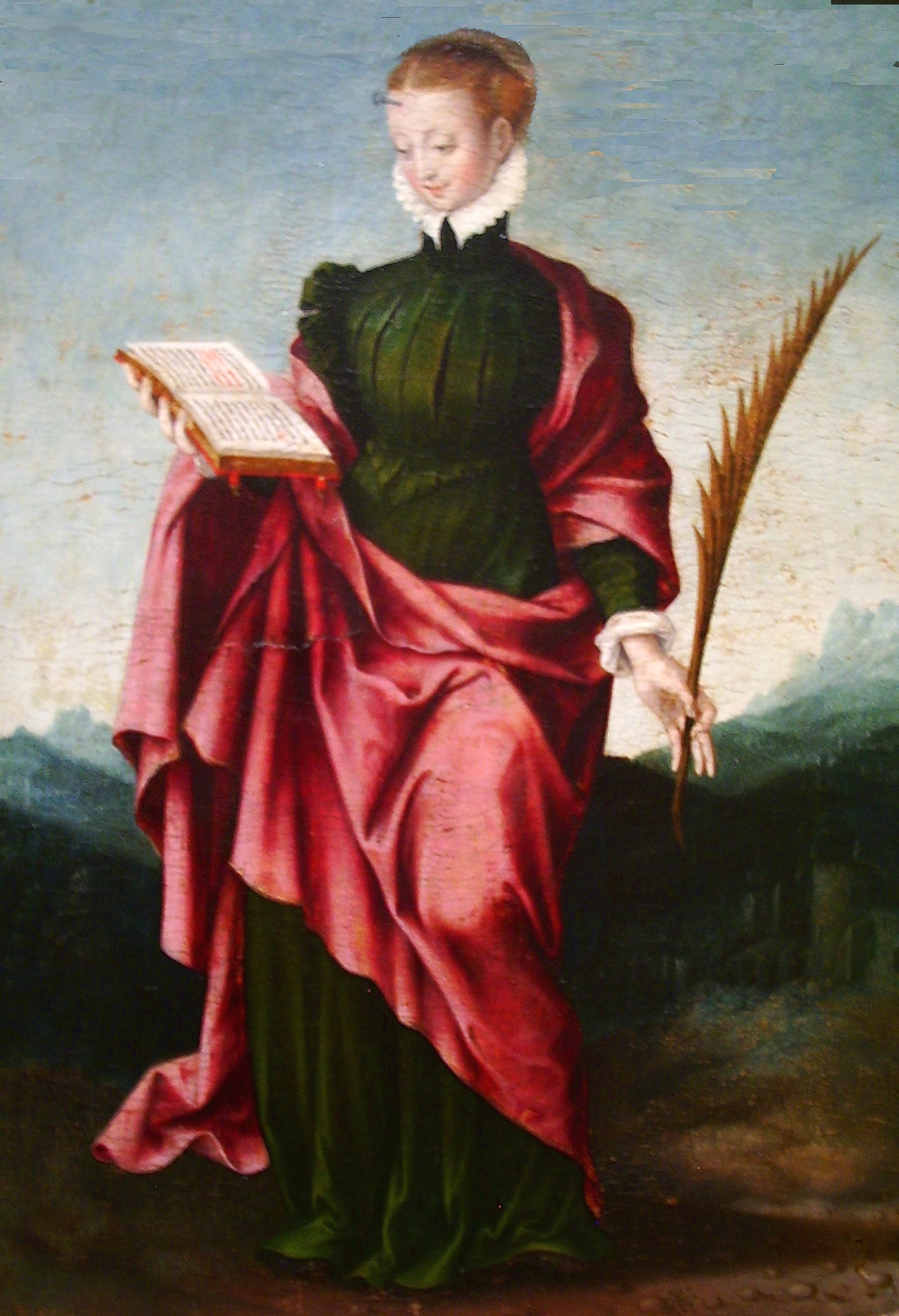 Tabla derecha del retablo de la Virgen del Museo de Zaragoza